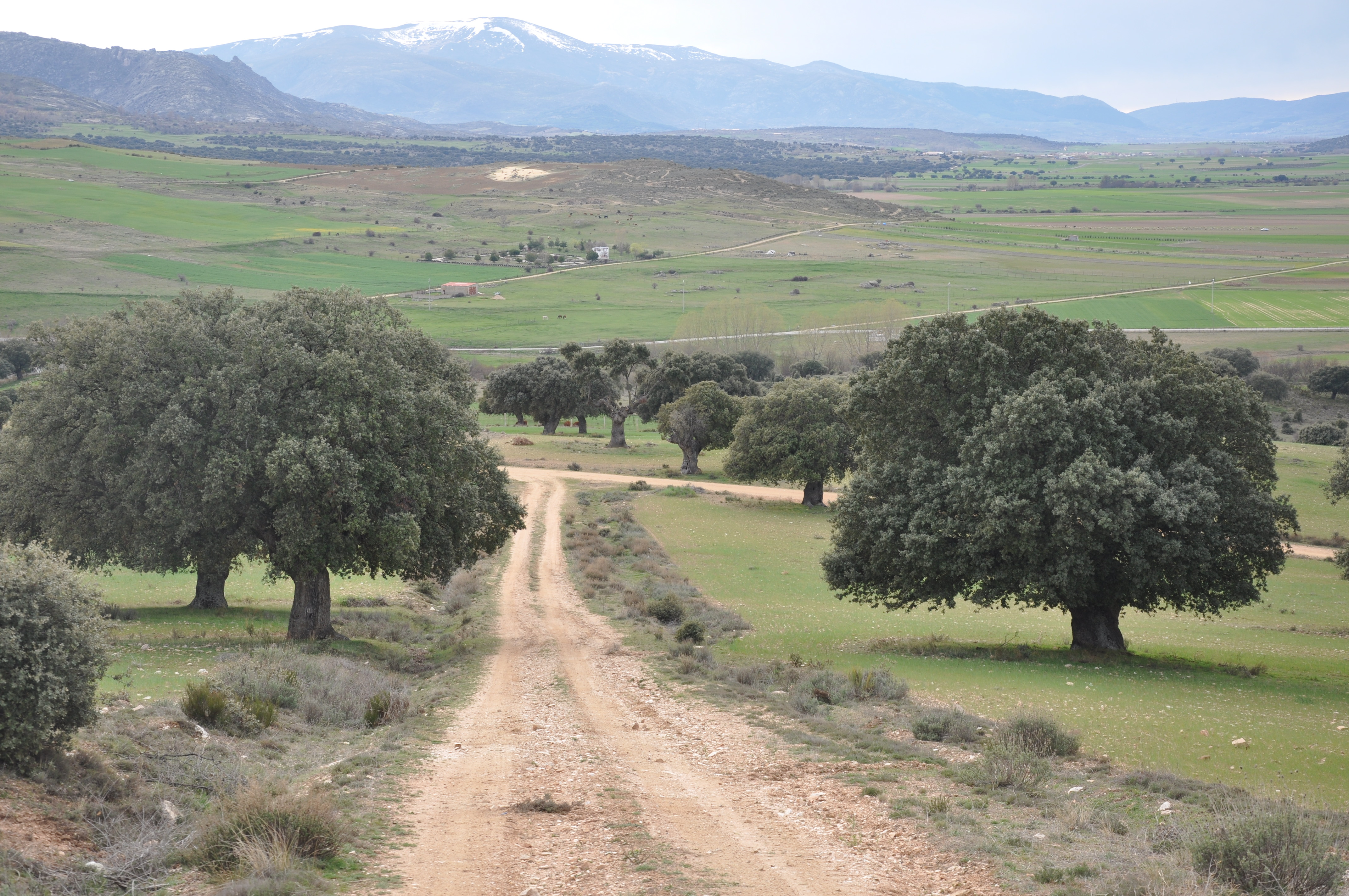 La Serrota, Ávila, España.